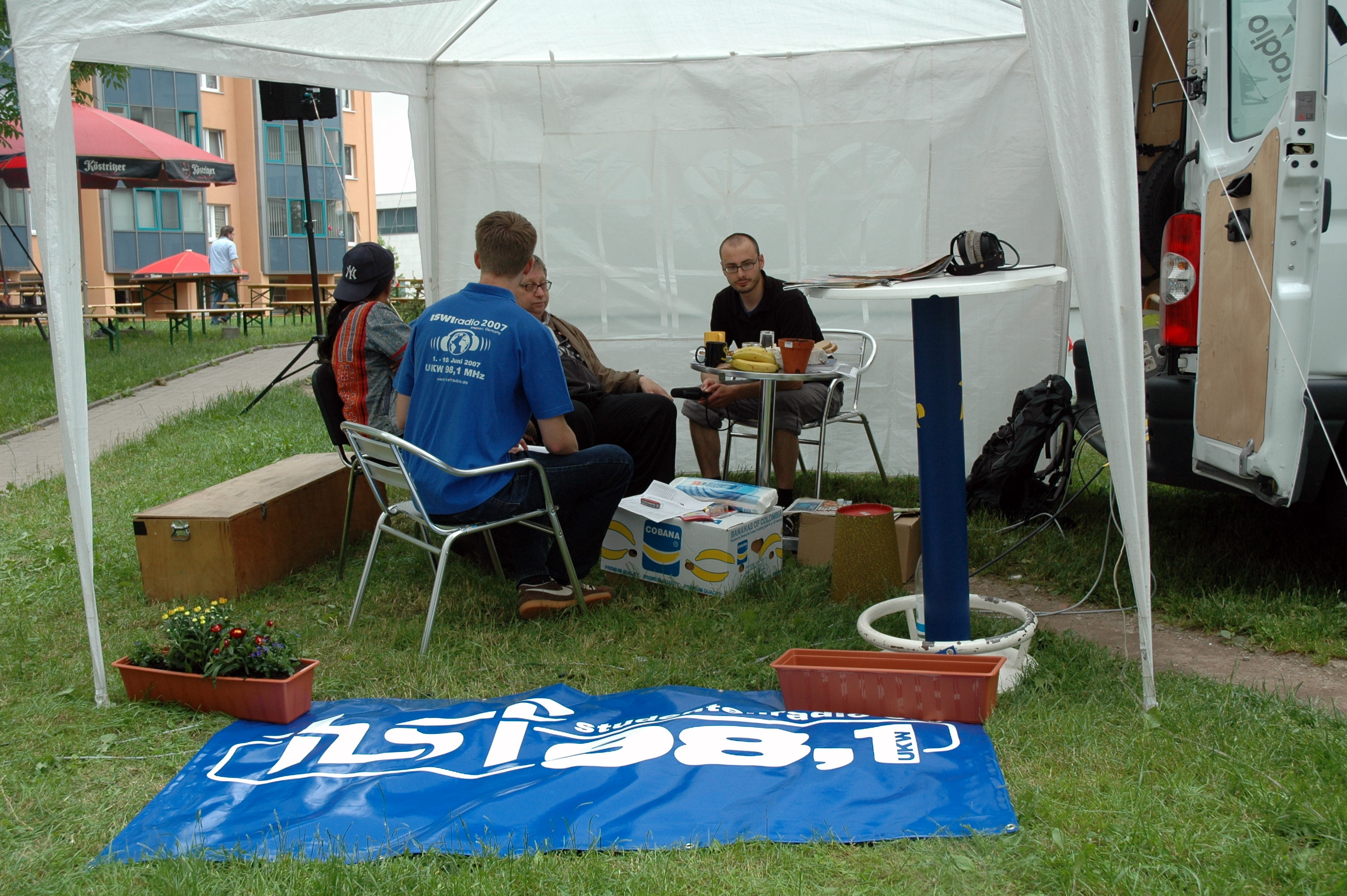 Danny Schechter ( at hsf ISWIradio, Ilmenau, Germany, 04. June 2007